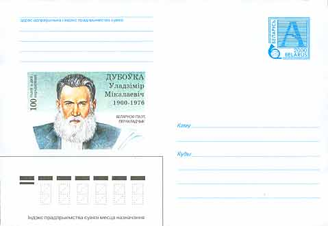 Художественный маркированный конверт со стандартной маркой, выпущенный РО "Белпочта" к 100-летию со дня рождения Дубовки Владимира Николаевича (1900-1976)